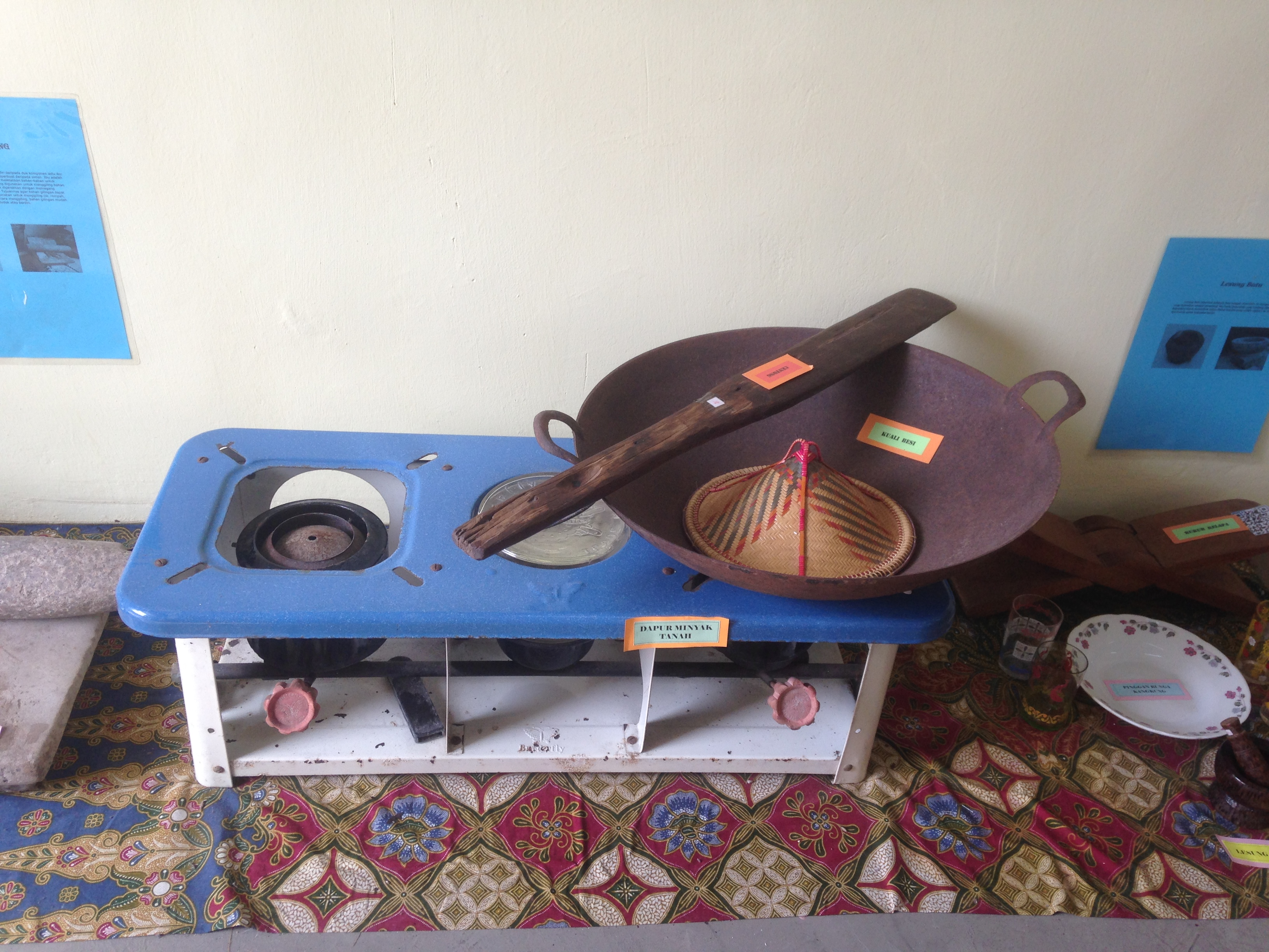 PERALATAN DAPUR